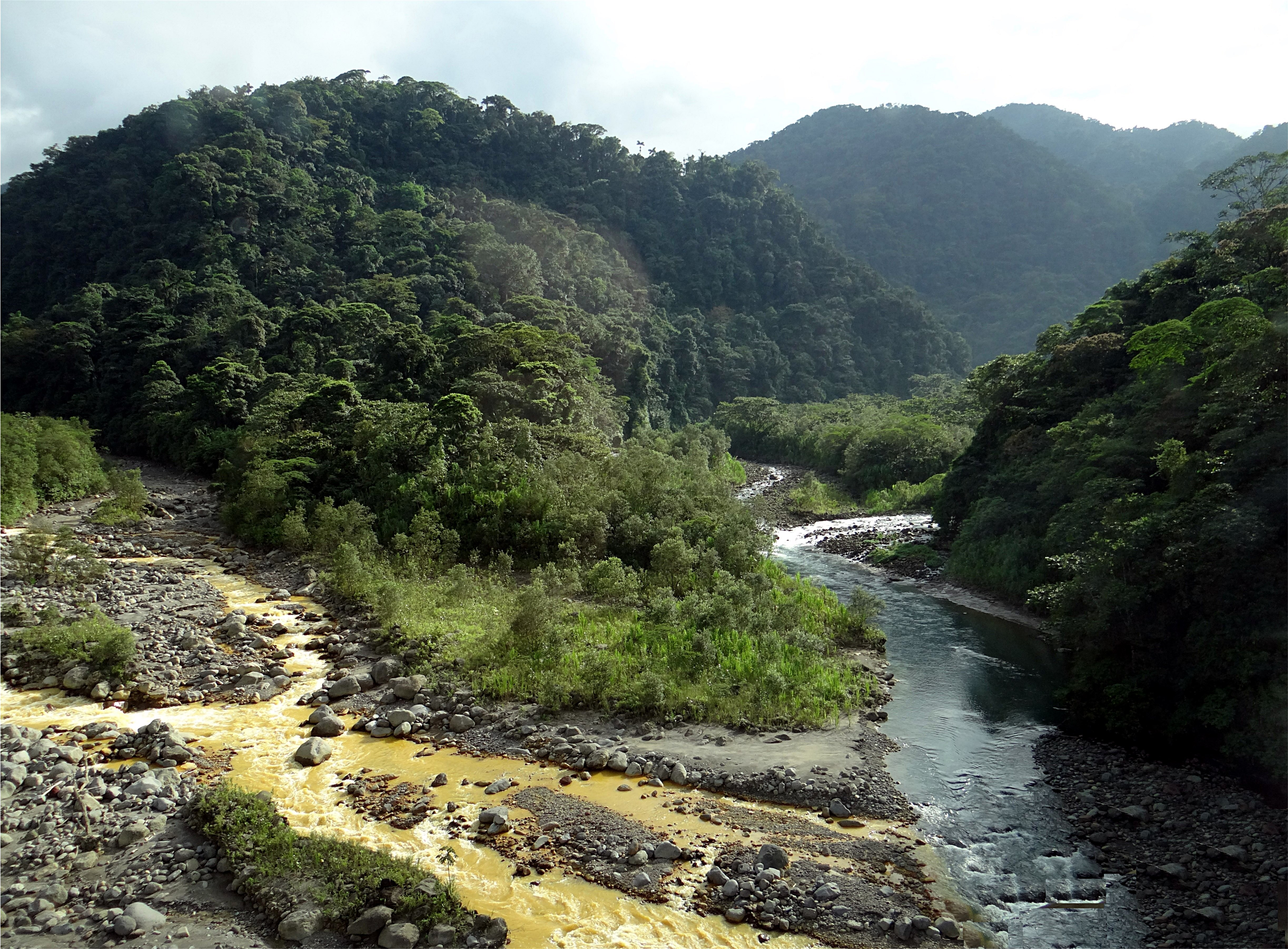 Confluent du Rio Sucio (rivière sale) et du Río Hondura au niveau de la route 32 dans le Parc national Braulio Carrillo, Costa Rica.